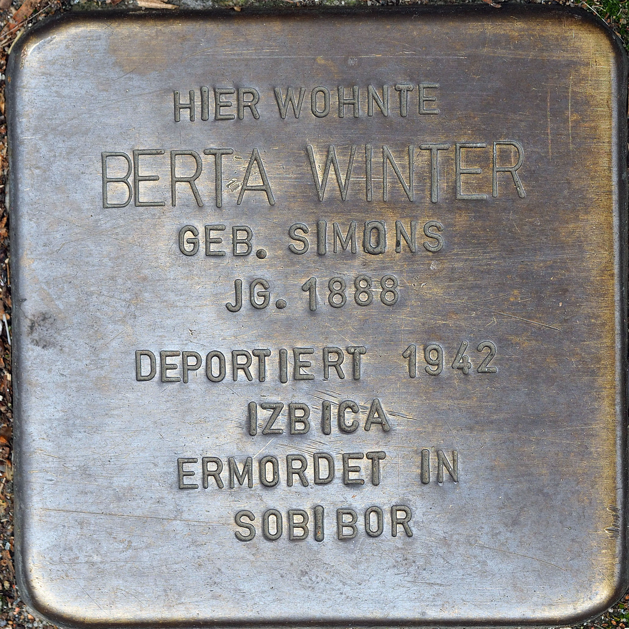 Stolpersteine MG: Winter, Berta